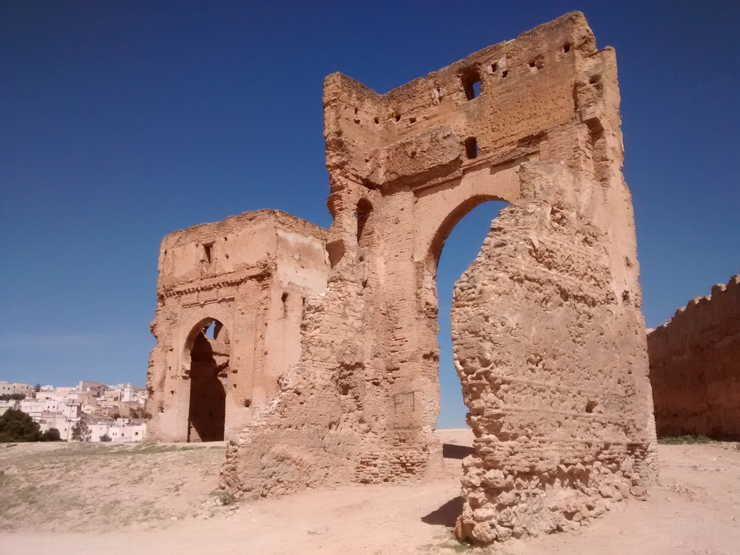 Marinid Tombs in Fez, Morocco.